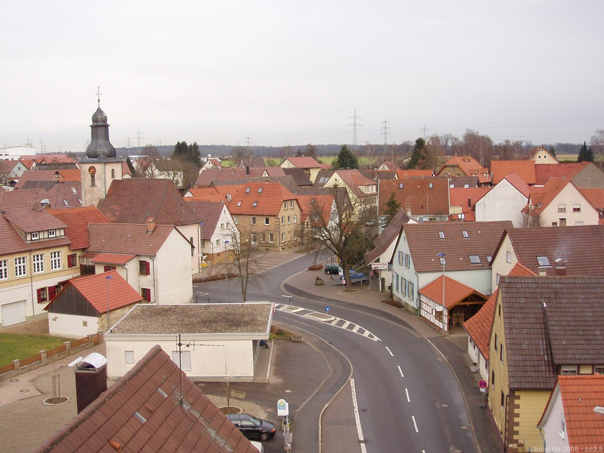 Ortsmitte von Siegelsbach, links die evang. Kirche